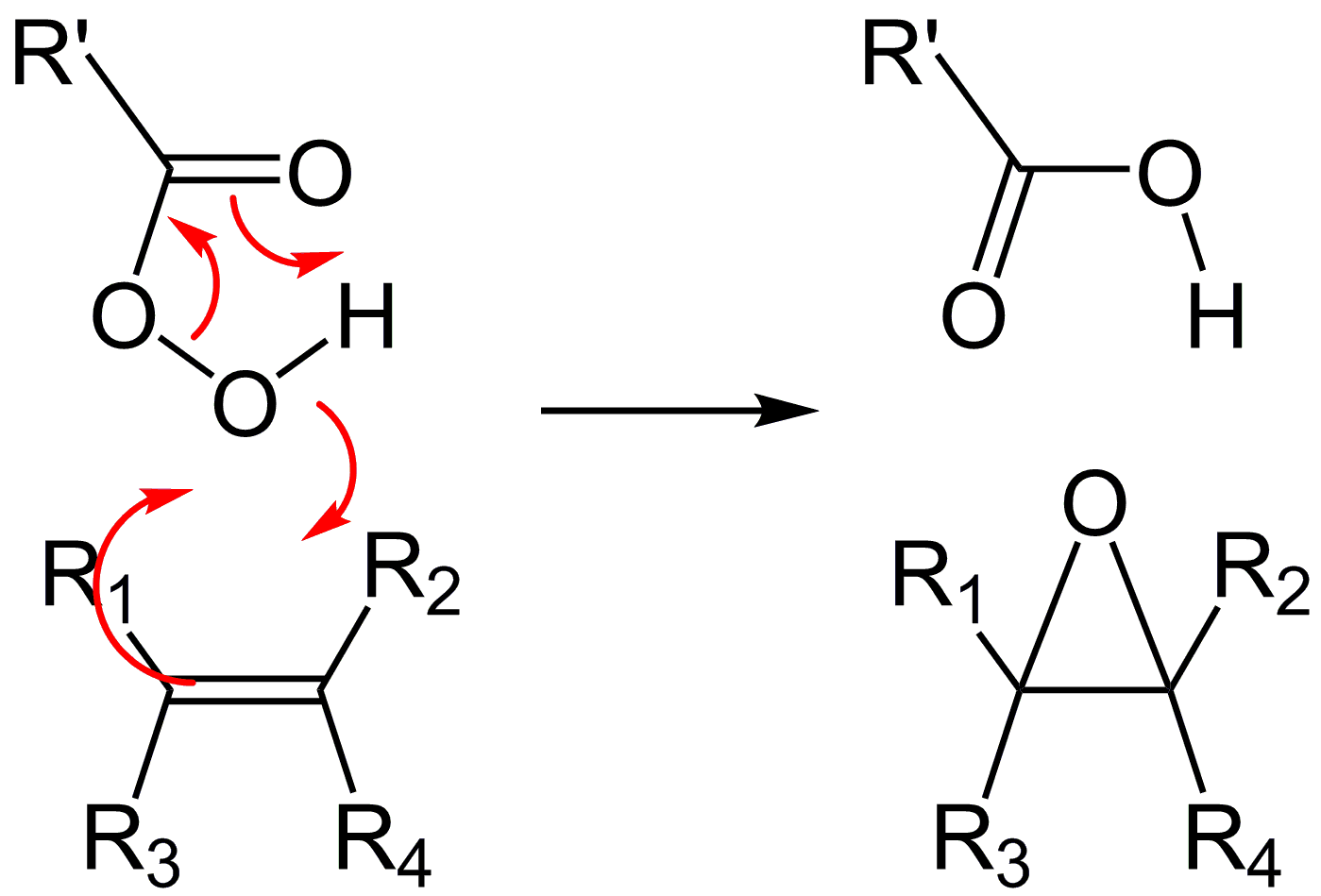 Butterflymechanismus bei der Epoxidbildung